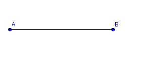 Il·lustració d'una de les proposiciones de les Data d'Euclides